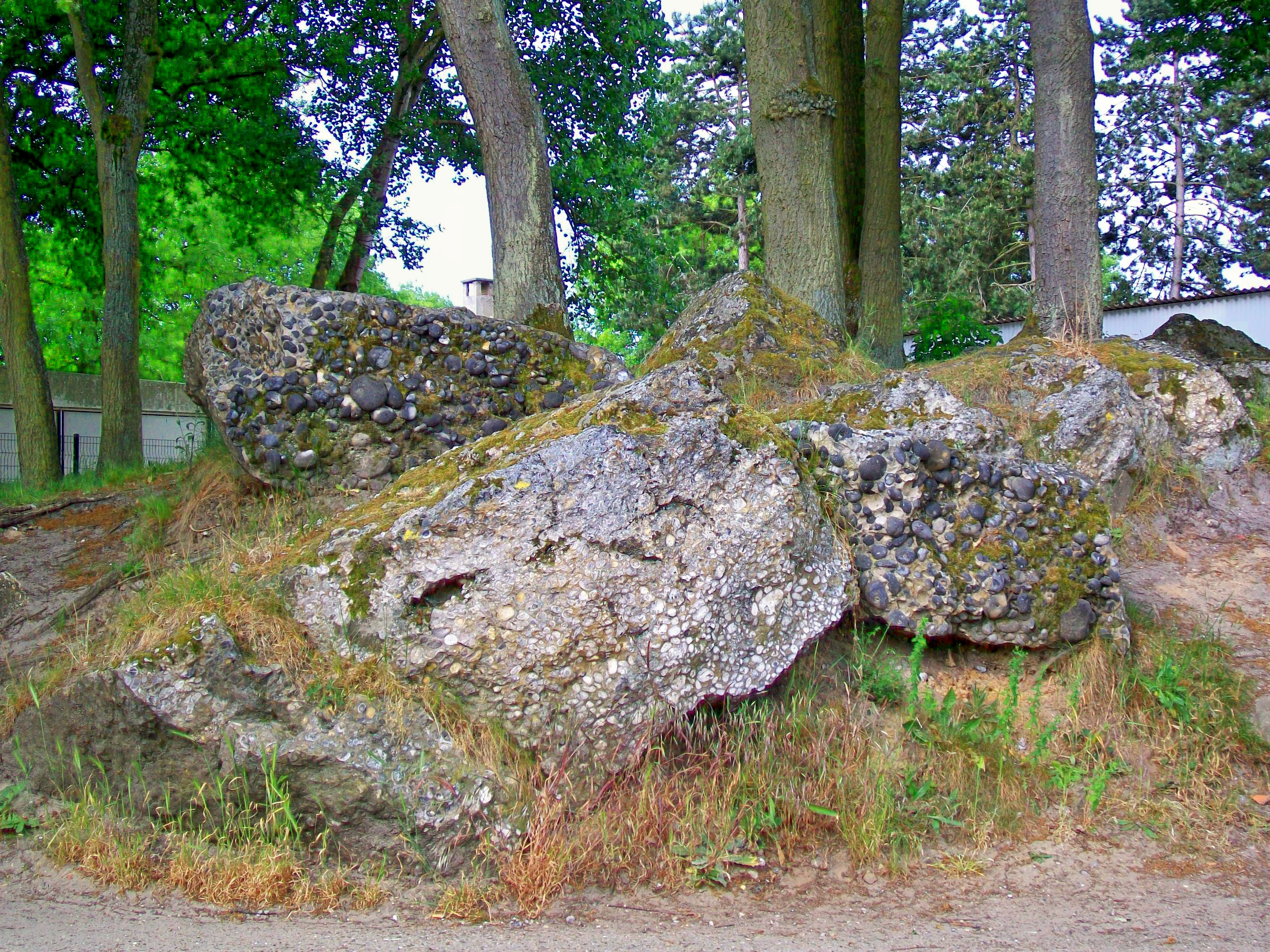 Coye-la-Forêt, Oise, France : Poudingue de Coye : des cailloux de silex enfermés dans des blocs de grès. La formation géologique n'est que partiellement conservé ; quelques blocs ont été enlevés et d'autres déplacés